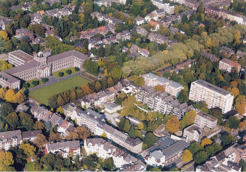 Gymnasium am Moltkeplatz aus der Vogelperspektive